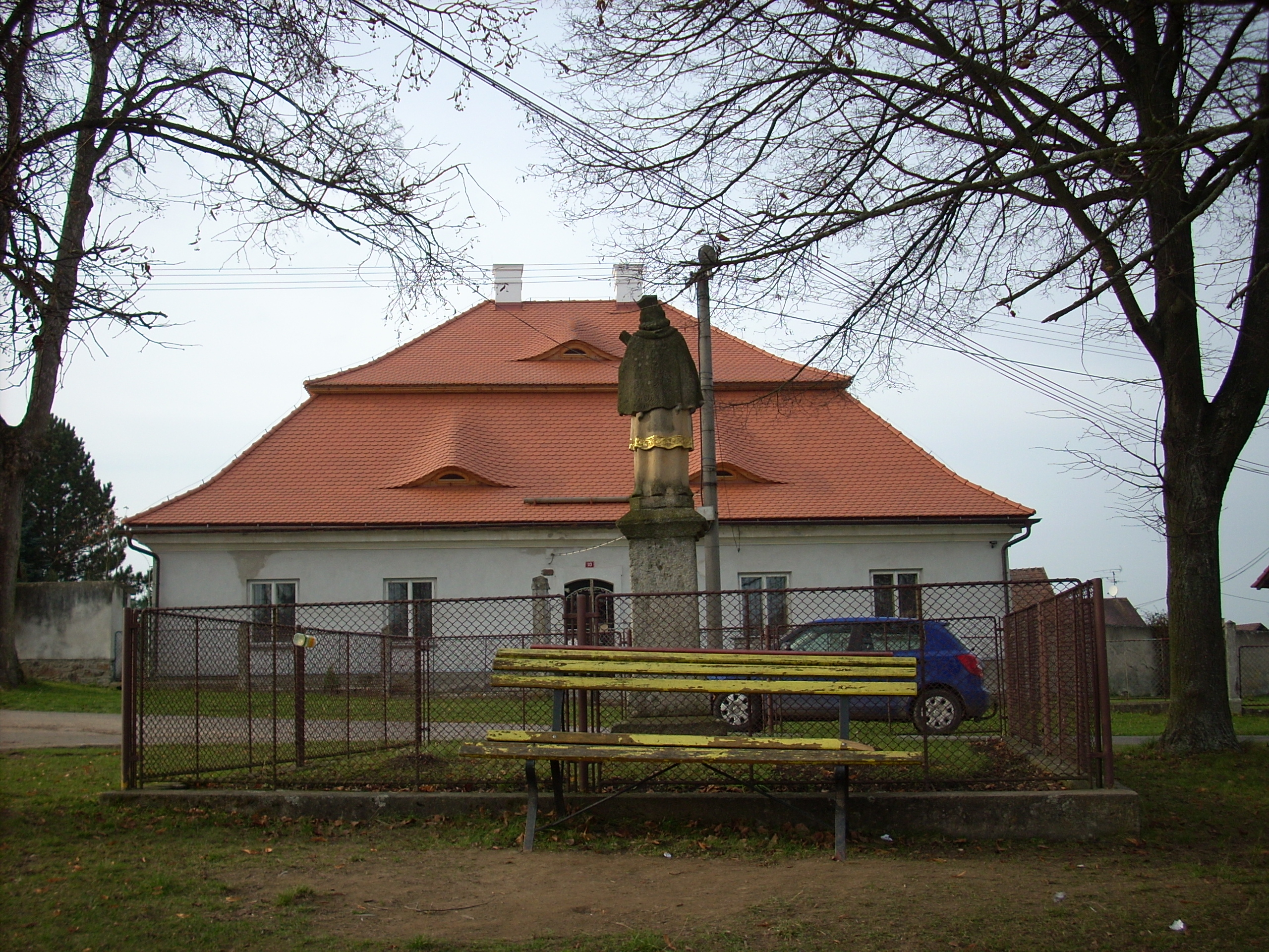 Nížkov, fara vpředu socha sv. Jana Nepomuckého